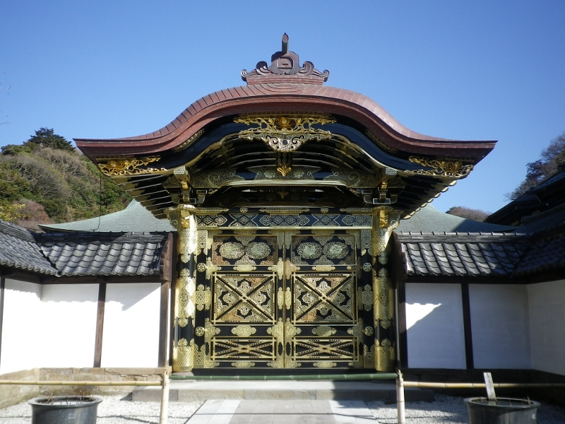 建長寺唐門